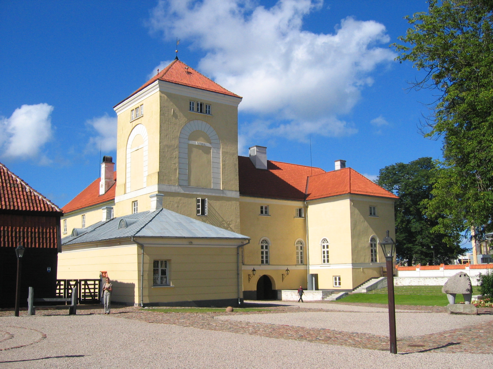 Livonian Castle in Ventspils, Latvia